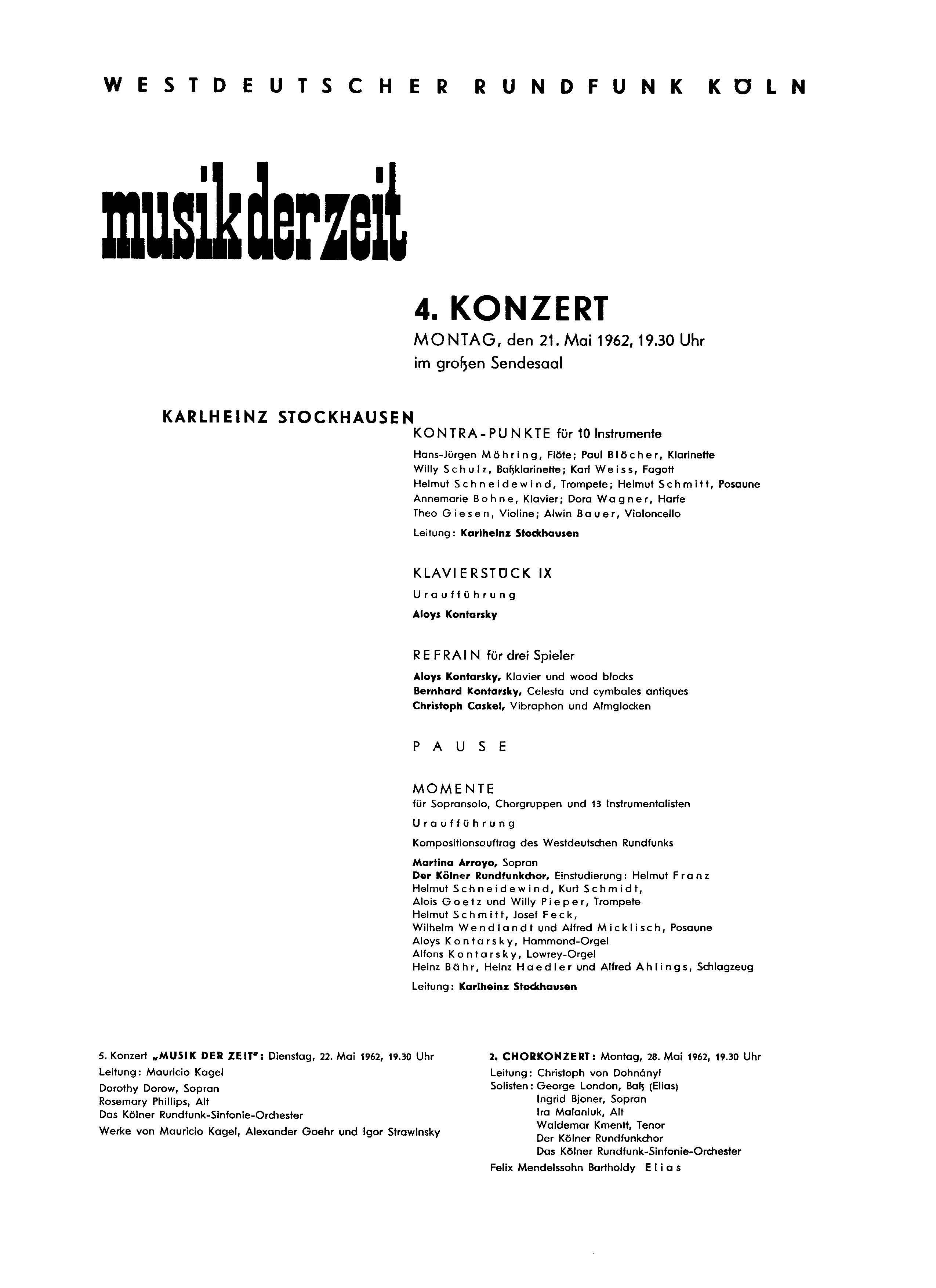 Abbildung des Programmblattes zum Konzert am 21. Mai 1962 im Westdeutschen Rundfunk (WDR) Köln mit Uraufführungen von Karlheinz Stockhausen